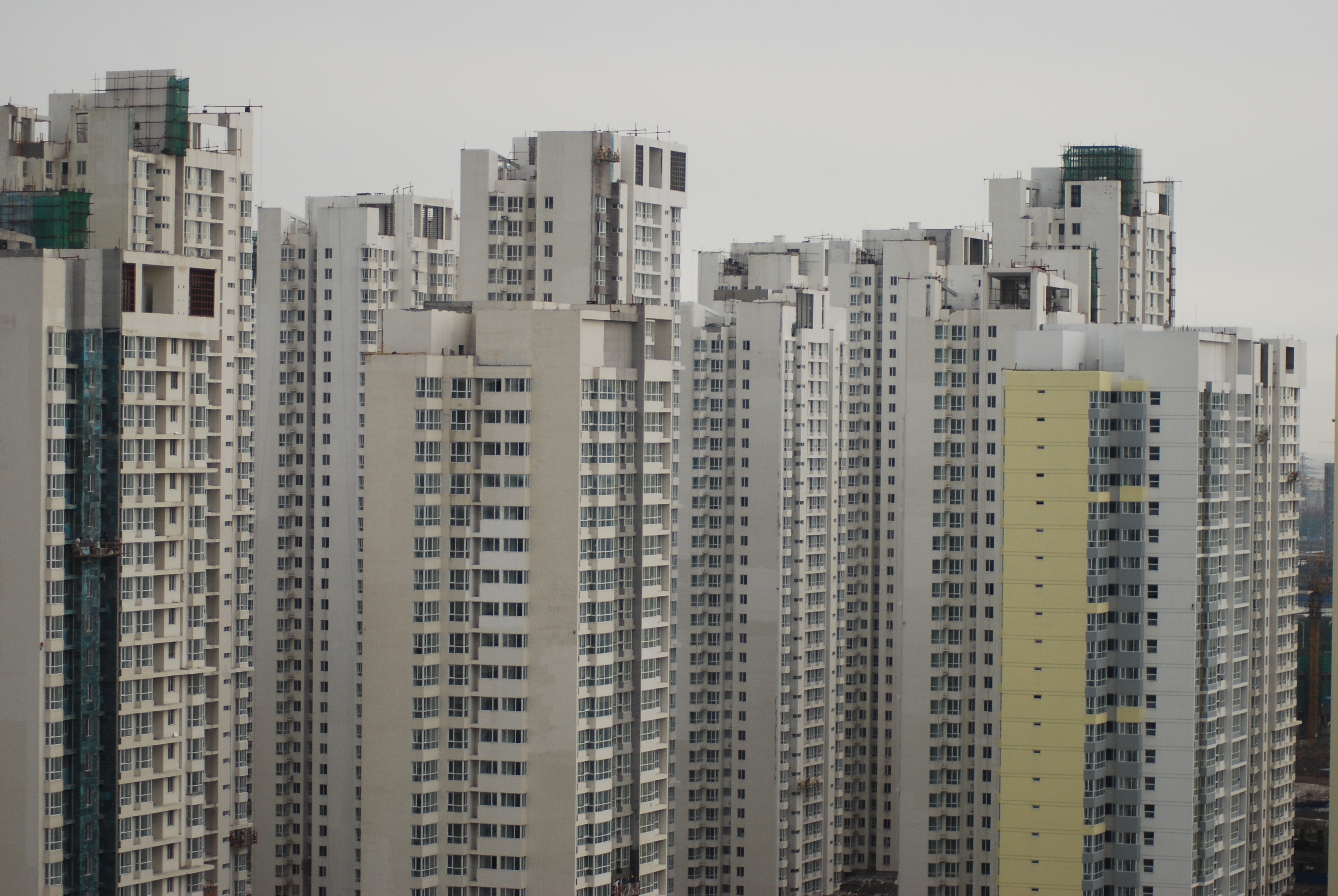 Logements concentrés à Tianjin